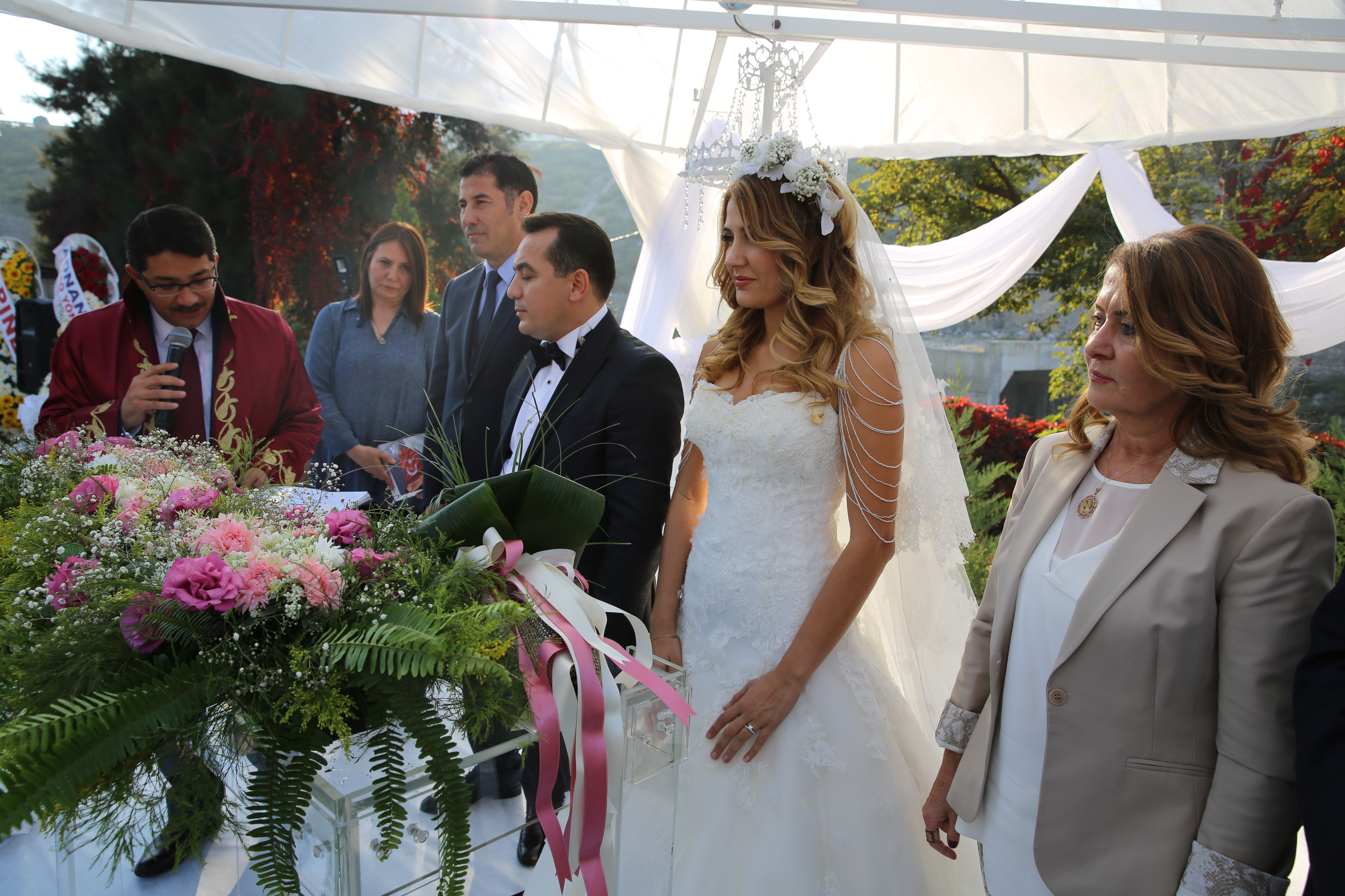 Hasan Eryılmaz Düğün Merasimi (Nikah Memuru: Şehzadeler Belediye Başkanı Ömer Çelik, Şahit: Mhp 25.Dönem Iğdır MV Sinan Oğan)